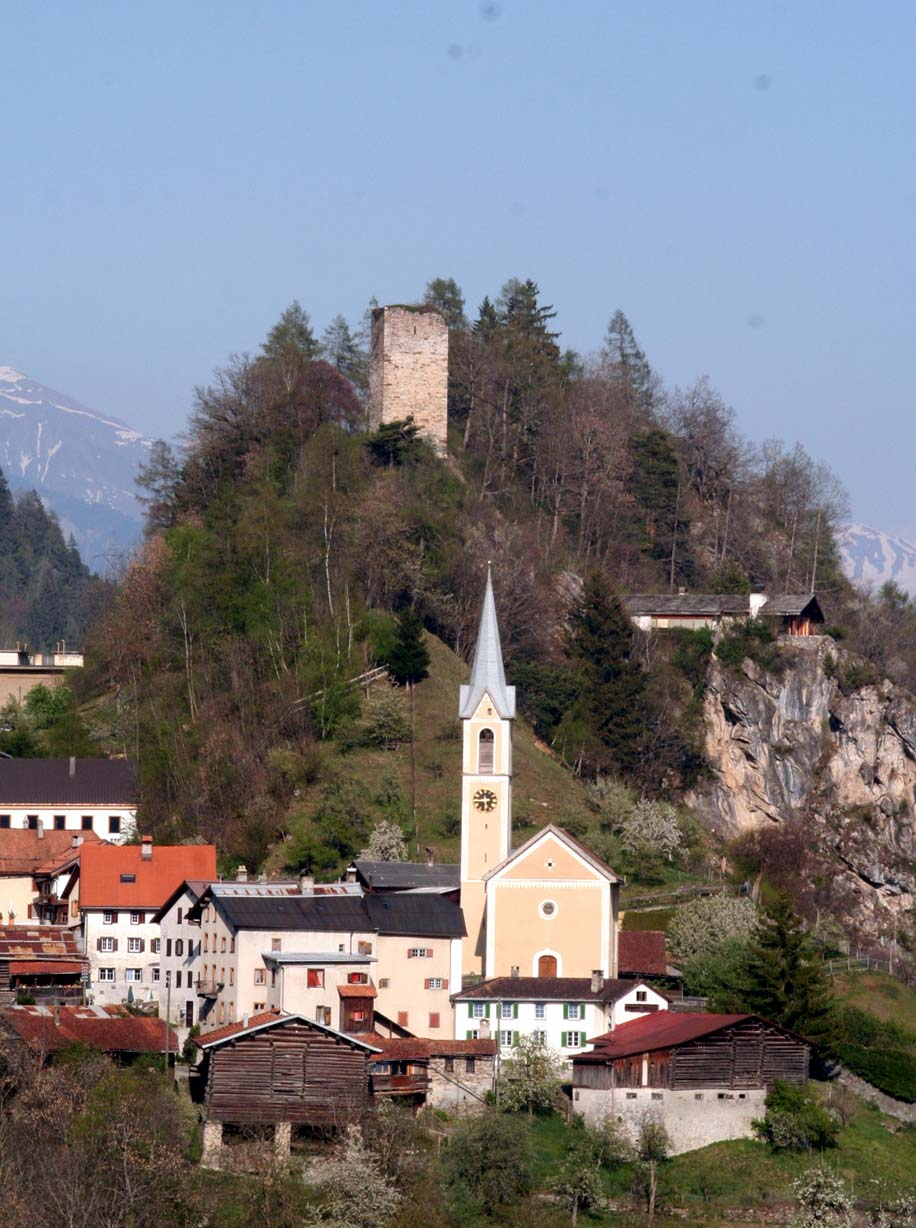 Burg Canaschal in Trin